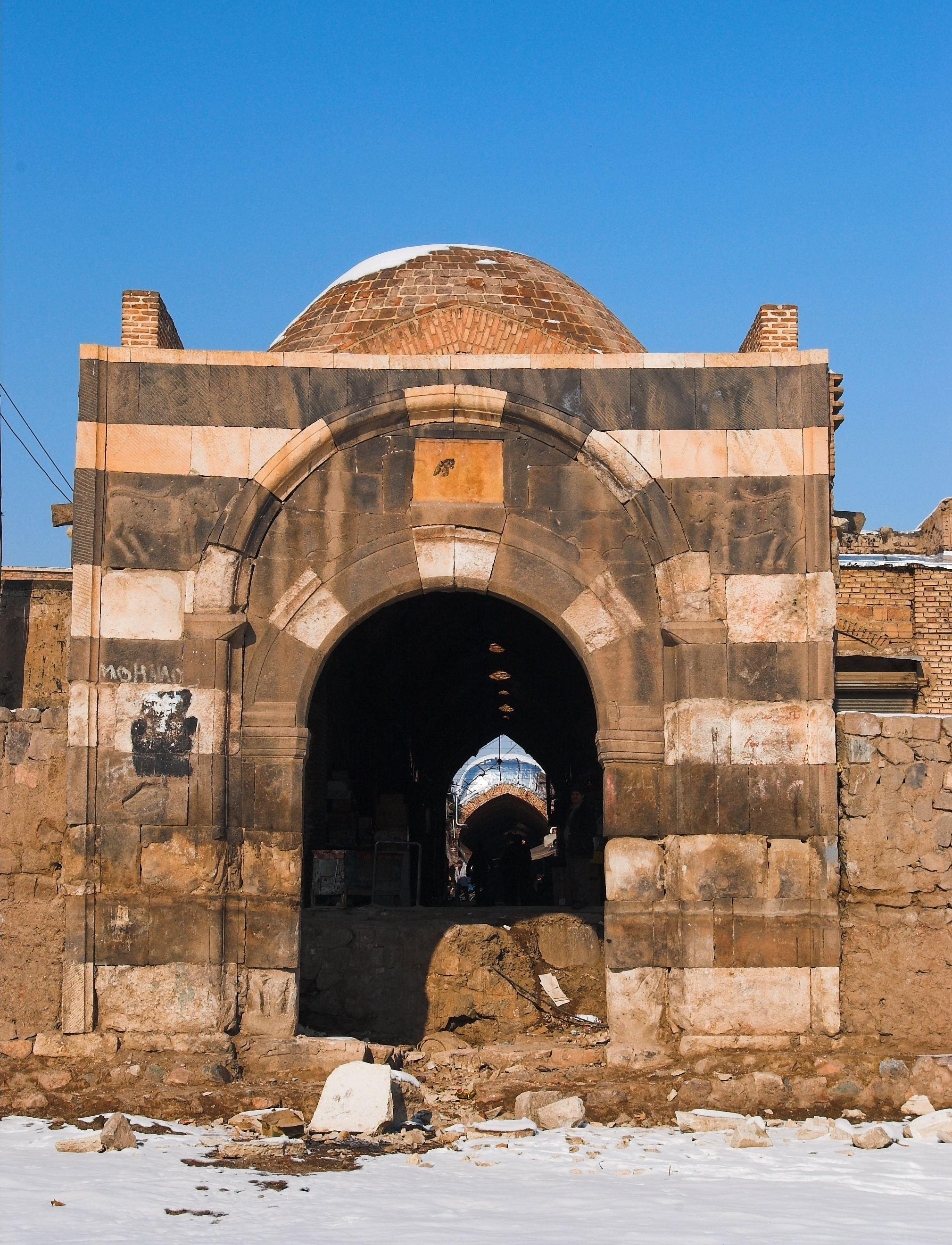 Darvazeh Sangi (Rocky door), Khoy Bazaar. Iranian azerbaijan.